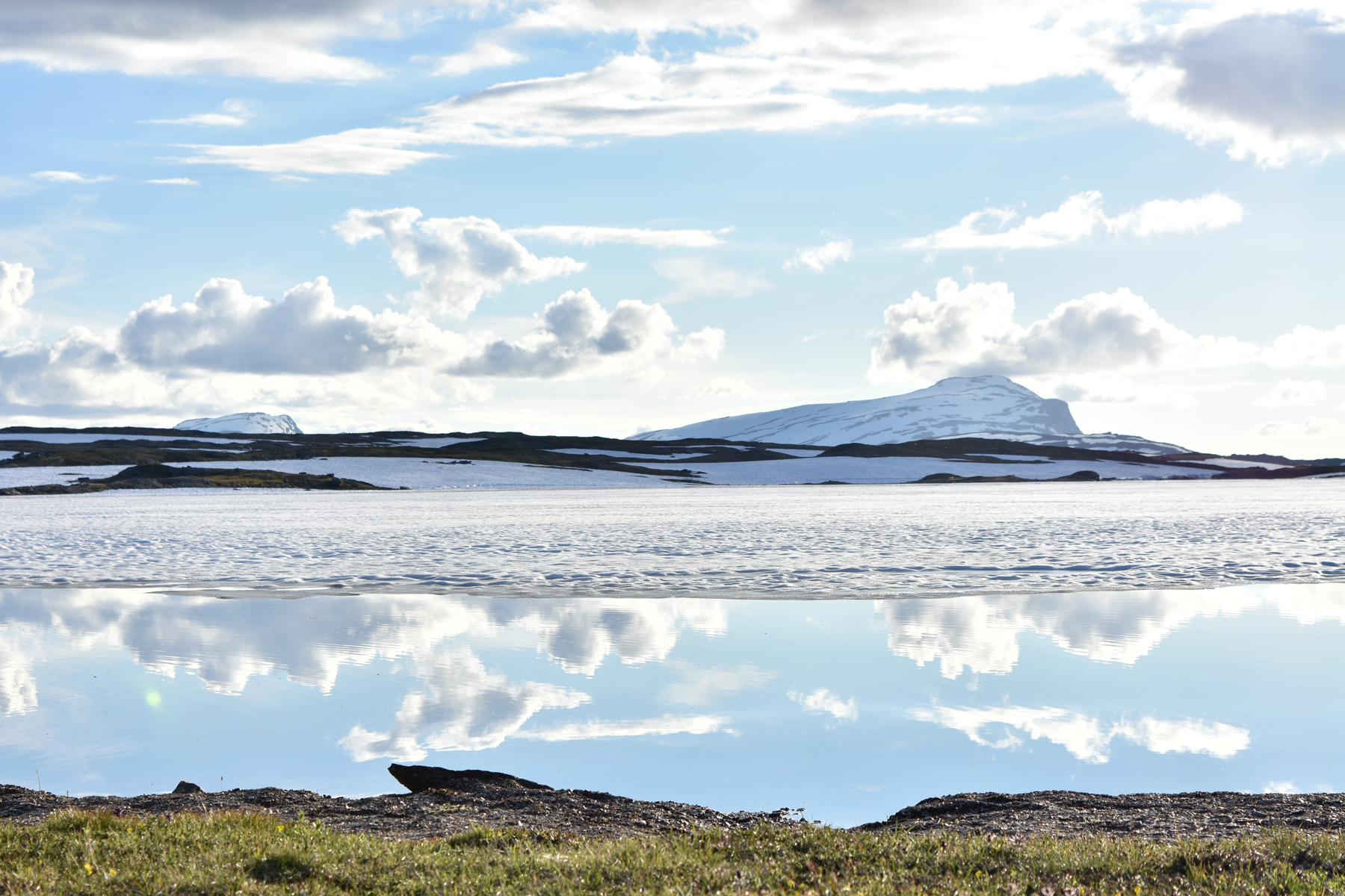 Guovdoajvejávrátja.